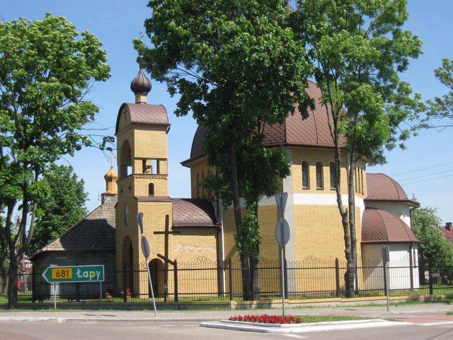 Brańsk, cerkiew